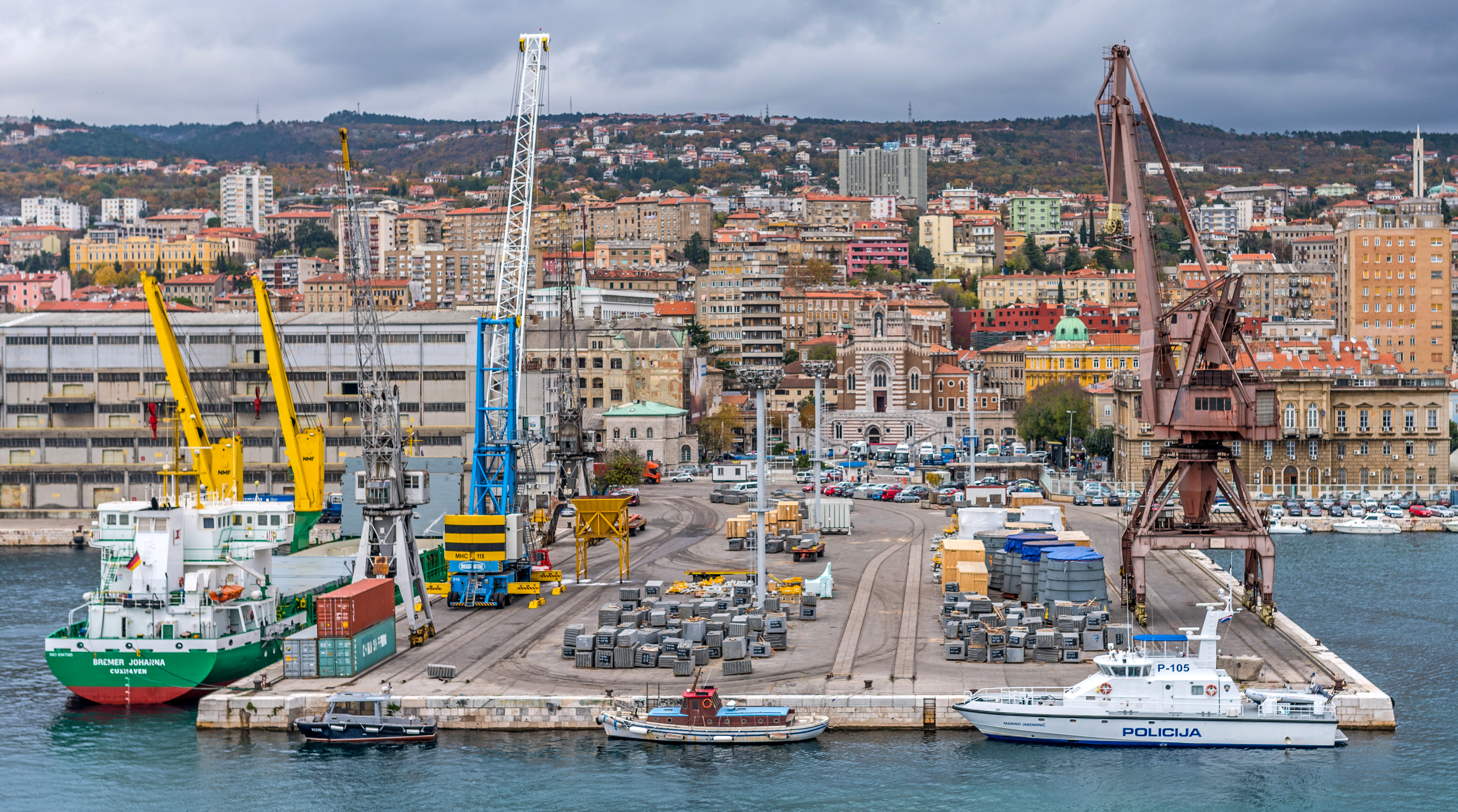 Rijeka Croatia November 2017